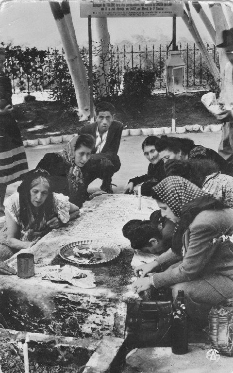 יהודי תלמסאן על קבר רבי אפריים אנקאווה